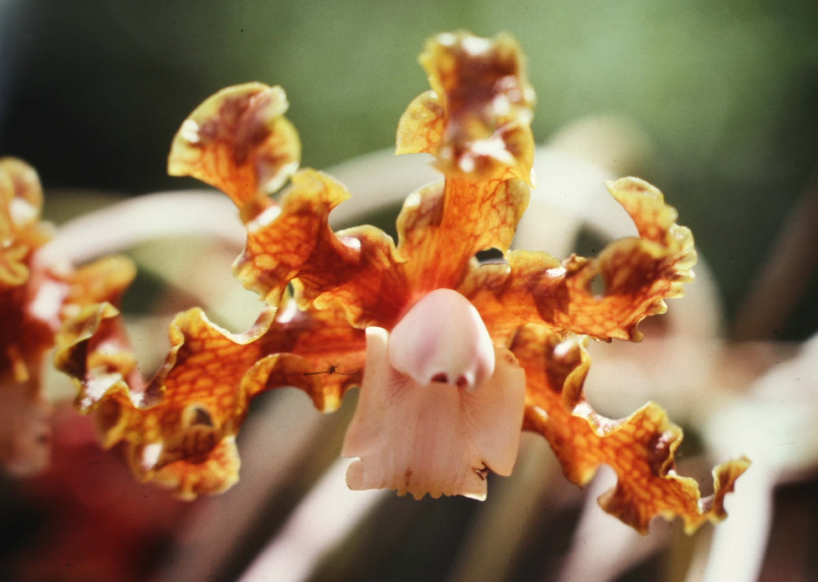 Laelia marginata (syn.'s Schomburgkia crispa or S. marginata).